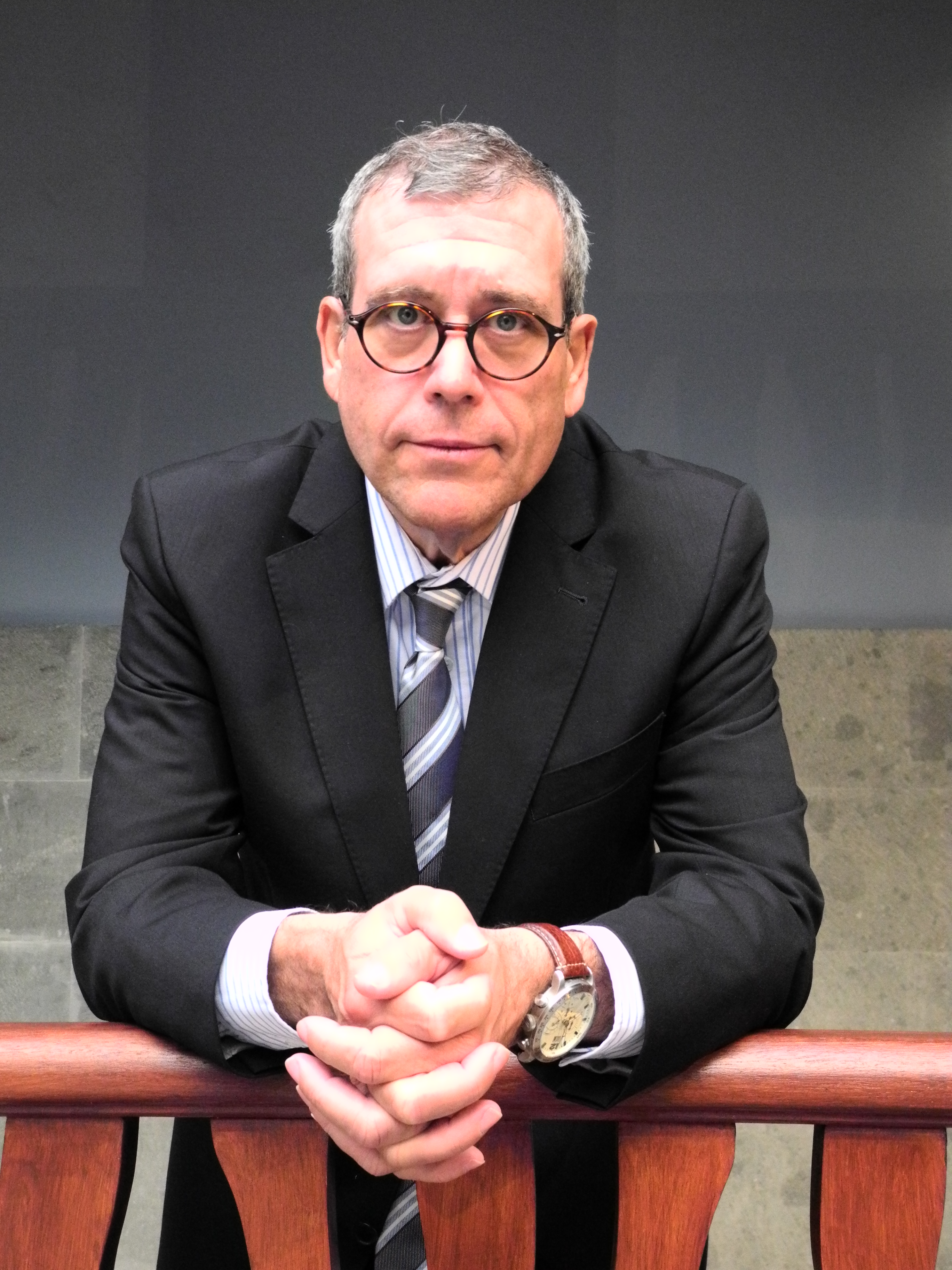 Santiago Martínez-Caro, diplomático español